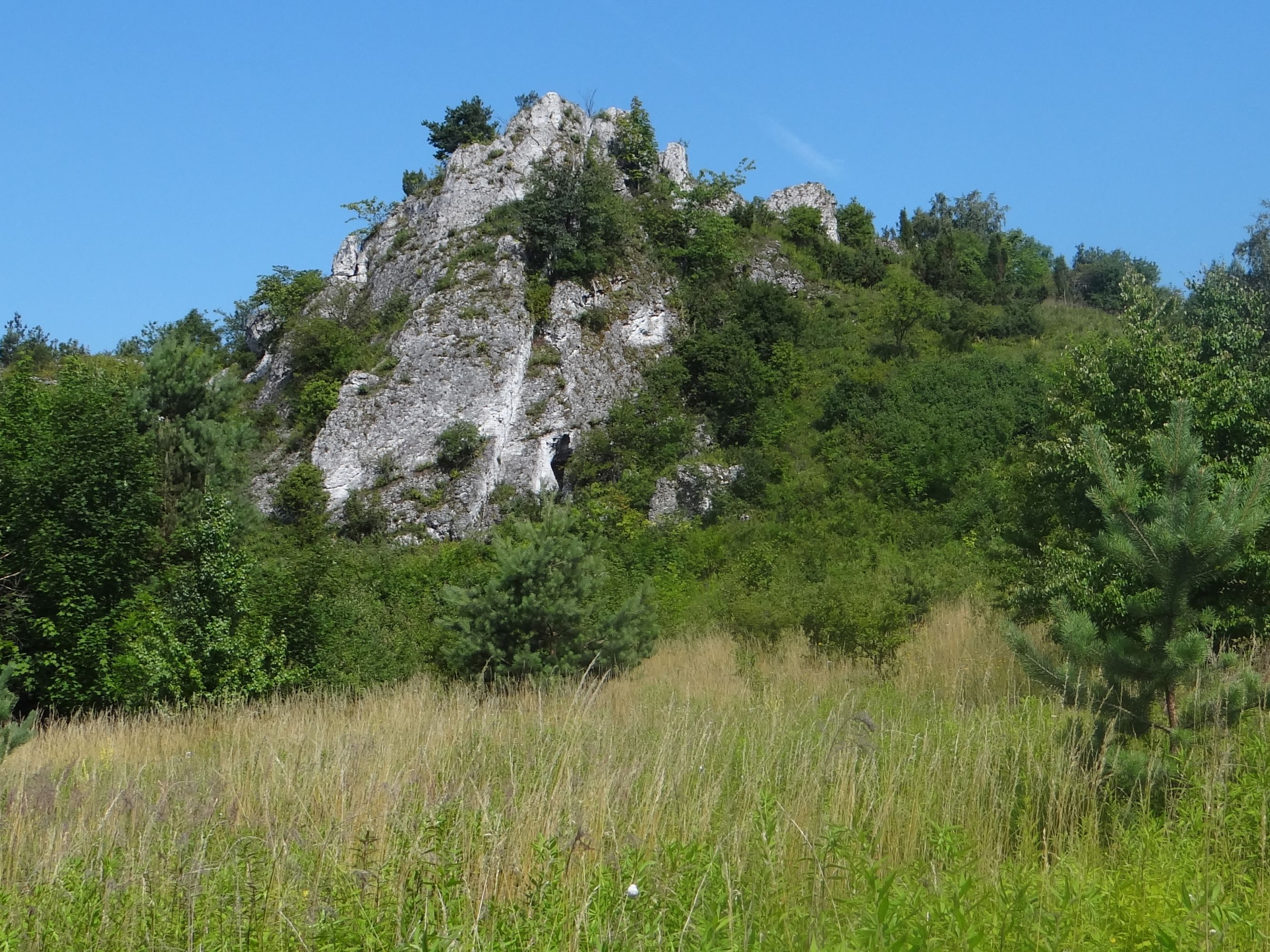 Skały na wzgórzu Łysa Pałka w Ryczowie